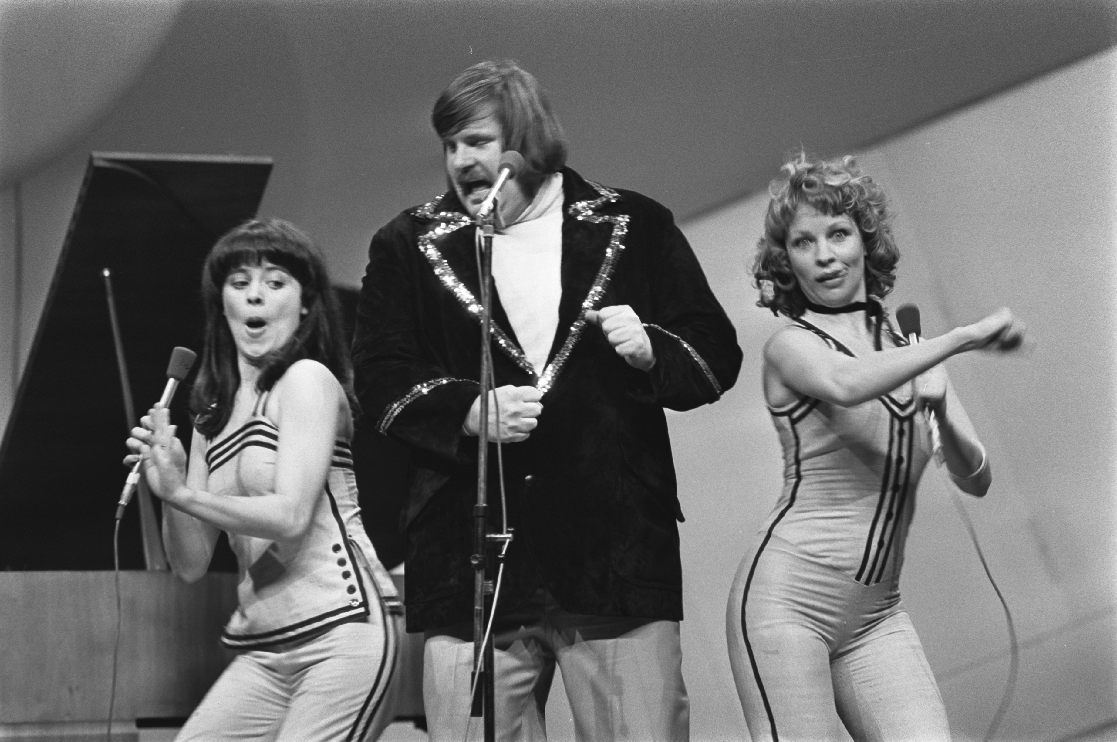 Collectie / Archief : Fotocollectie Anefo Reportage / Serie : [ onbekend ] Beschrijving : Eurovisie Songfestival 76 Den Haag ; Fredi + Friends (Finland) Datum : 3 april 1976 Locatie : Den Haag, Finland Trefwoorden : songfestivals Persoonsnaam : Eurovisie Songfestival Fotograaf : Mieremet, Rob / Anefo Auteursrechthebbende : Nationaal Archief Materiaalsoort : Negatief (zwart/wit) Nummer archiefinventaris : bekijk toegang 2.24.01.05 Bestanddeelnummer : 928-5024